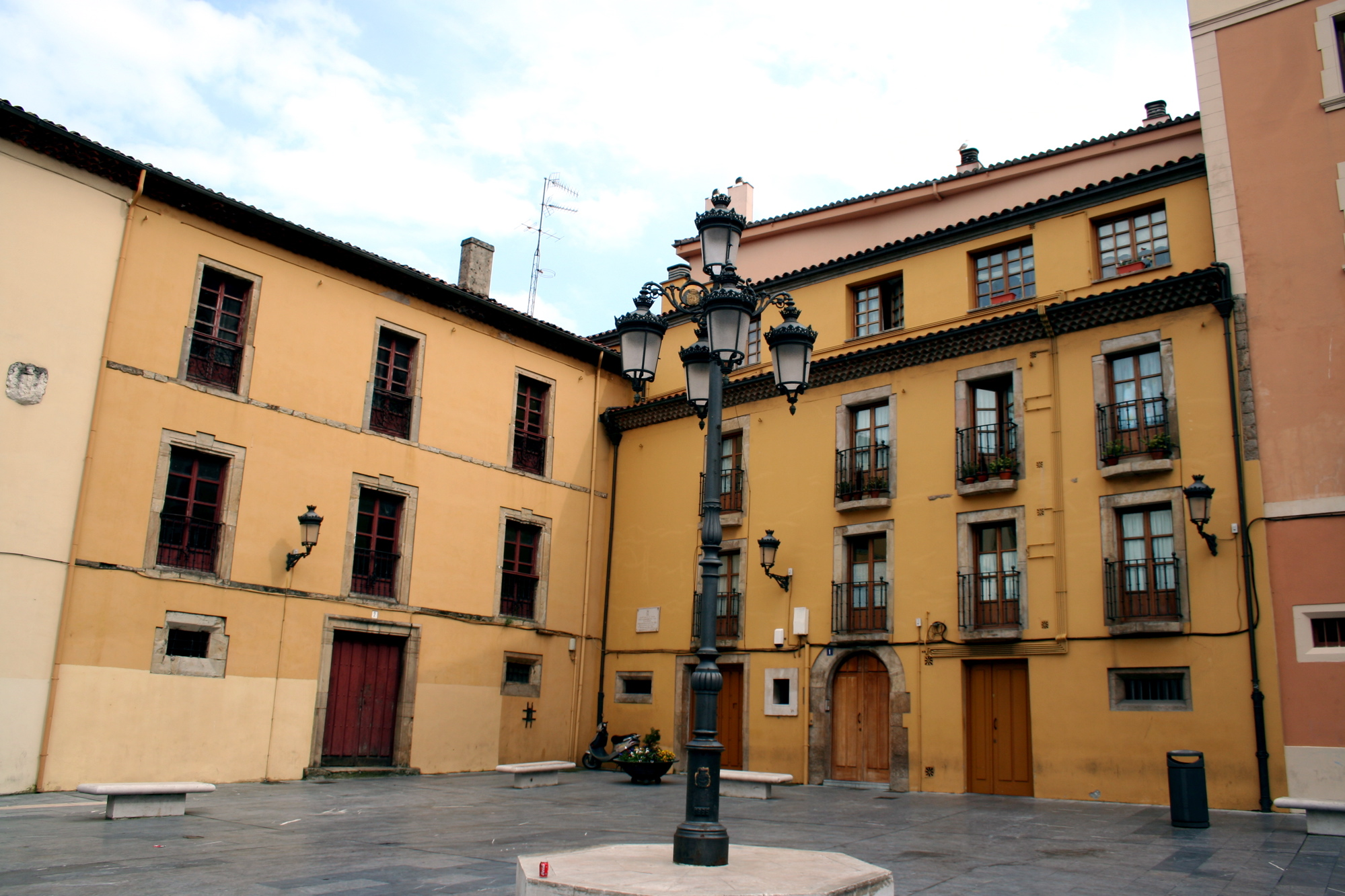 Plaza de Carlos Lobo en Avilés